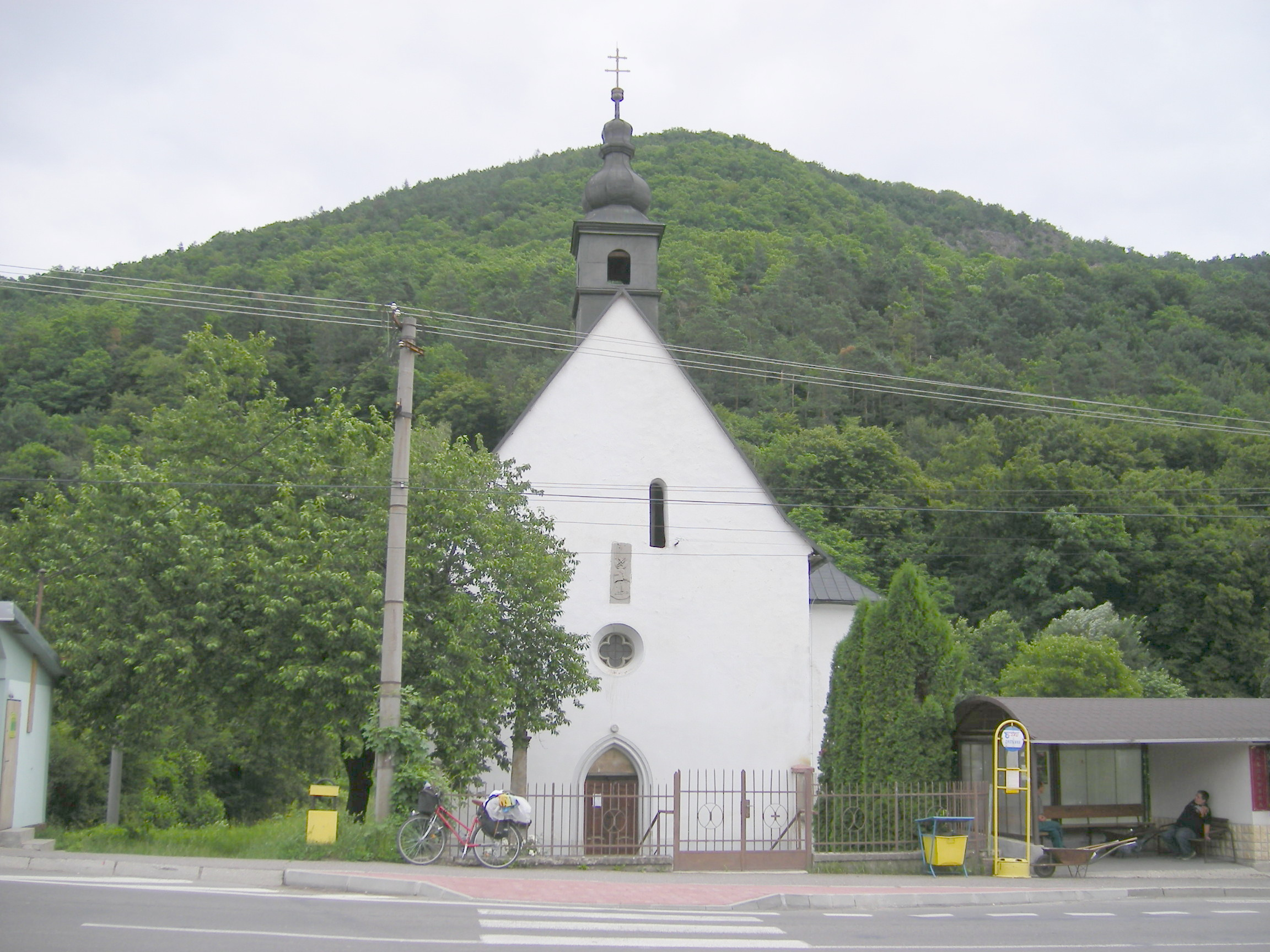 Nová Baňa (ZC), St. Elizabeth church